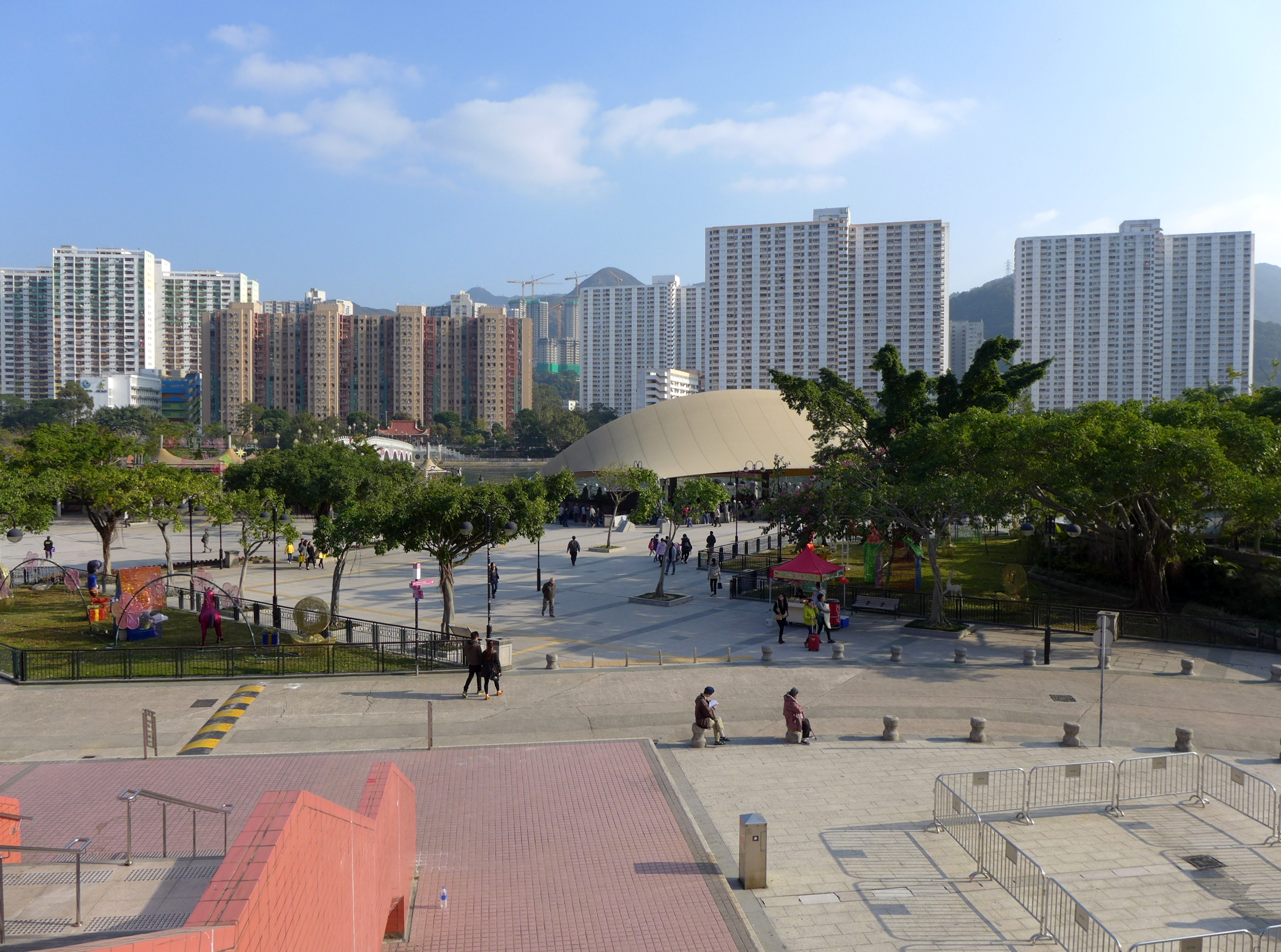 Sha Tin Park